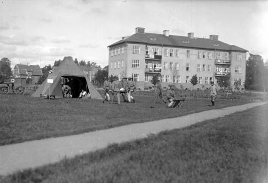 Garnisonssjukhuset vid regementet I 12 i Eksjö. I förgrunden pågår sjukvårdsutbildning i tält.